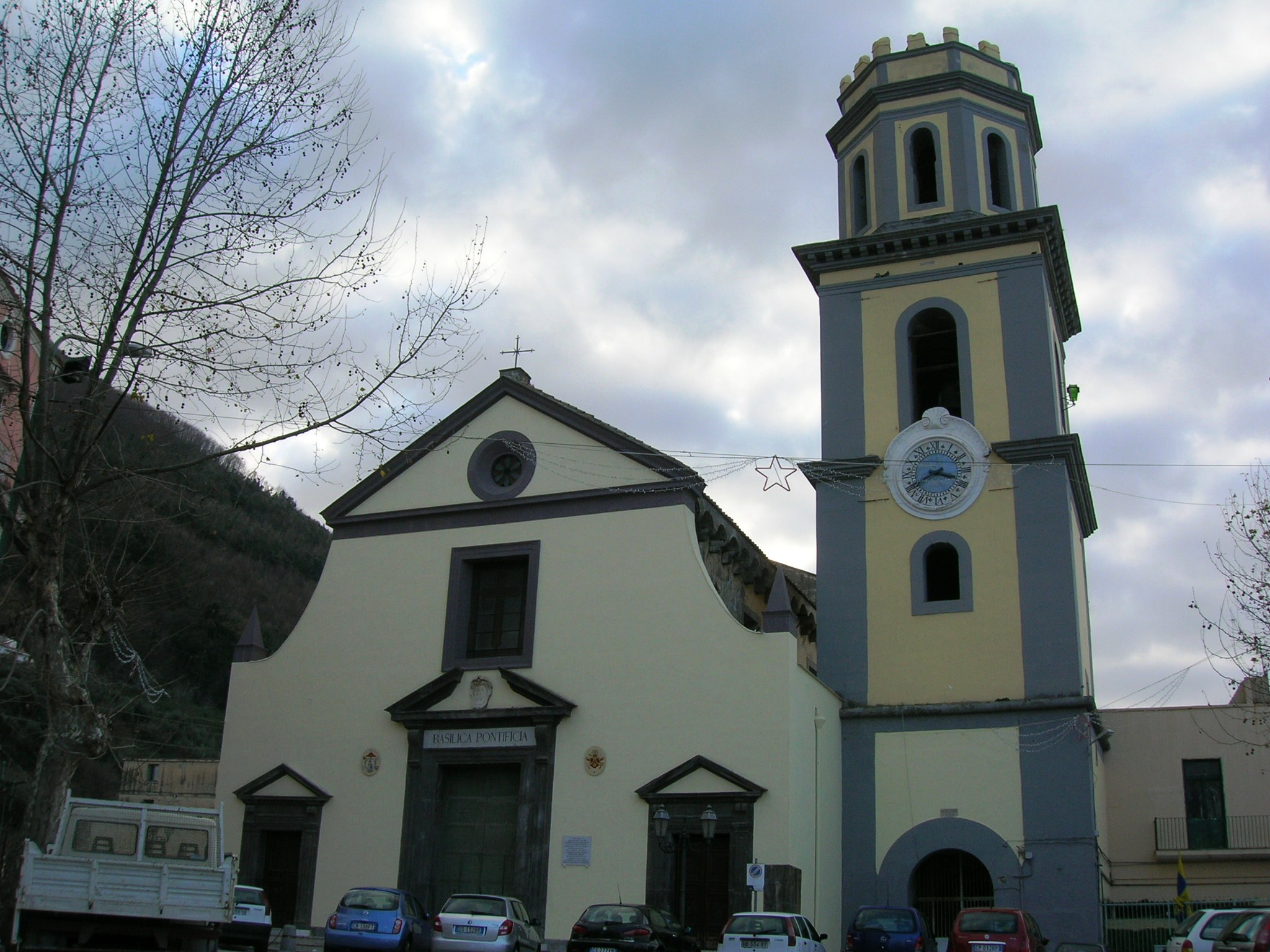 La facciata della basilica di Santa Maria di Pozzano